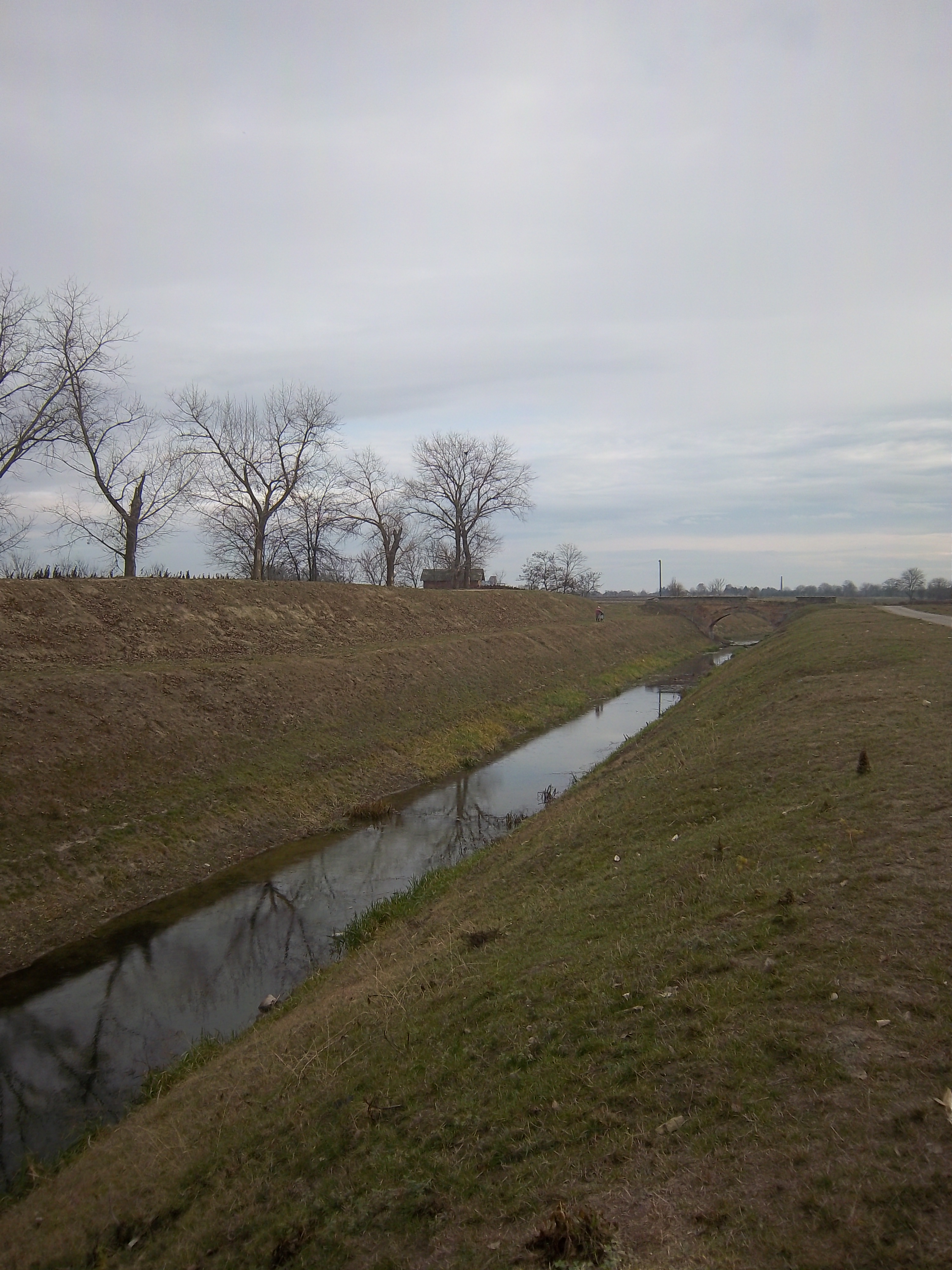 Bobotski kanal kod Bobote, općina Trpinja.